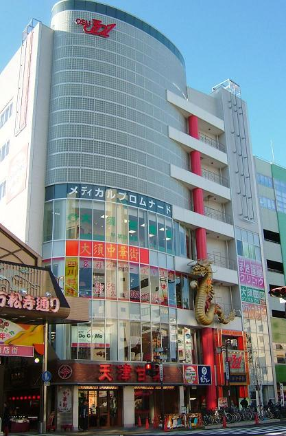 名古屋市中区大須の万松寺商店街入口に所在する、大須の新名所「大須301ビル」 投稿者 Gnsin 撮影日&場所 2005年1月13日(木) 名古屋市中区の大須301ビル前にて撮影。